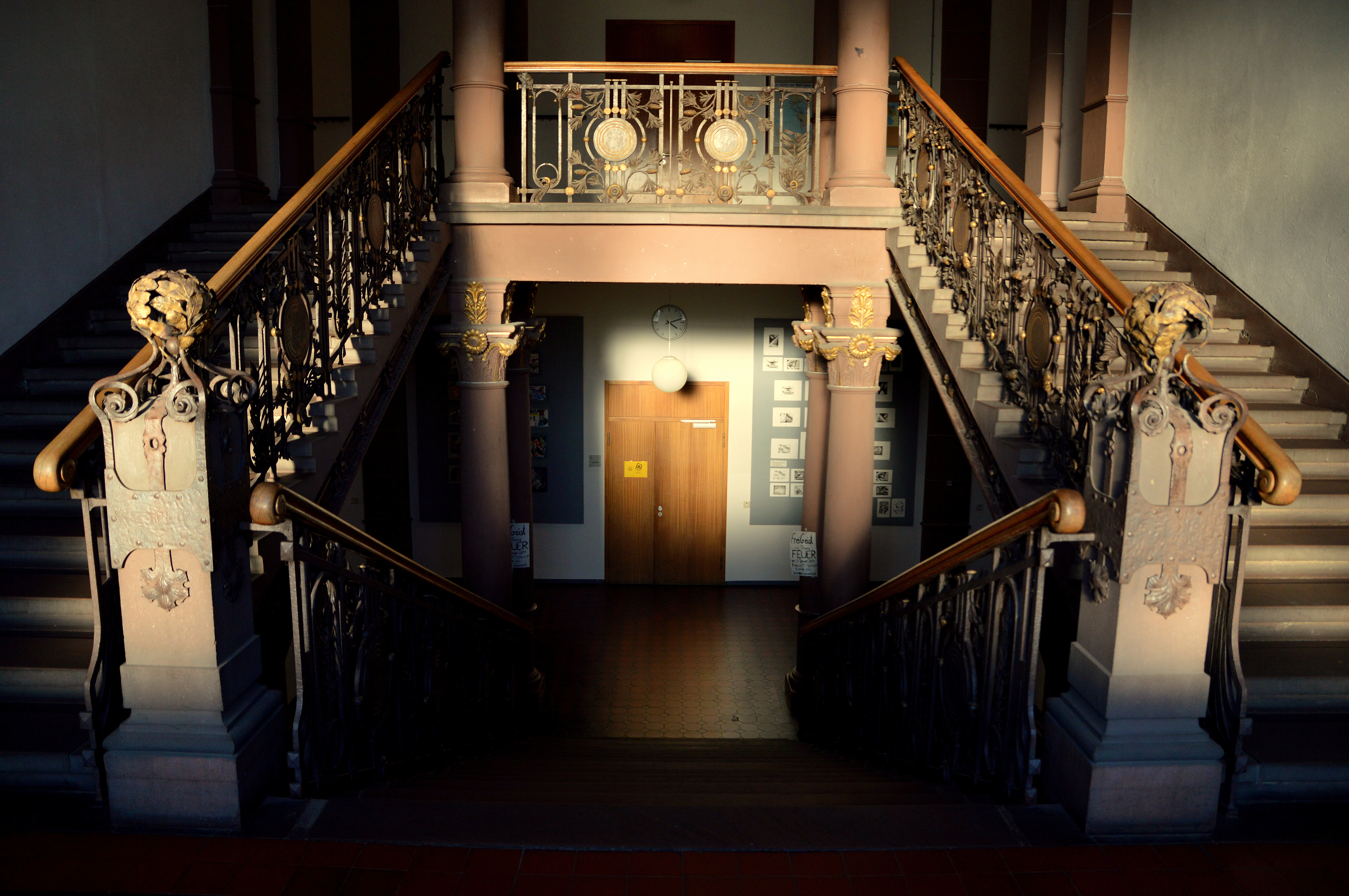 Fotografie Friedrich-Gymnasium Freiburg (im Breisgau) [FG] im Stadtteil Herdern